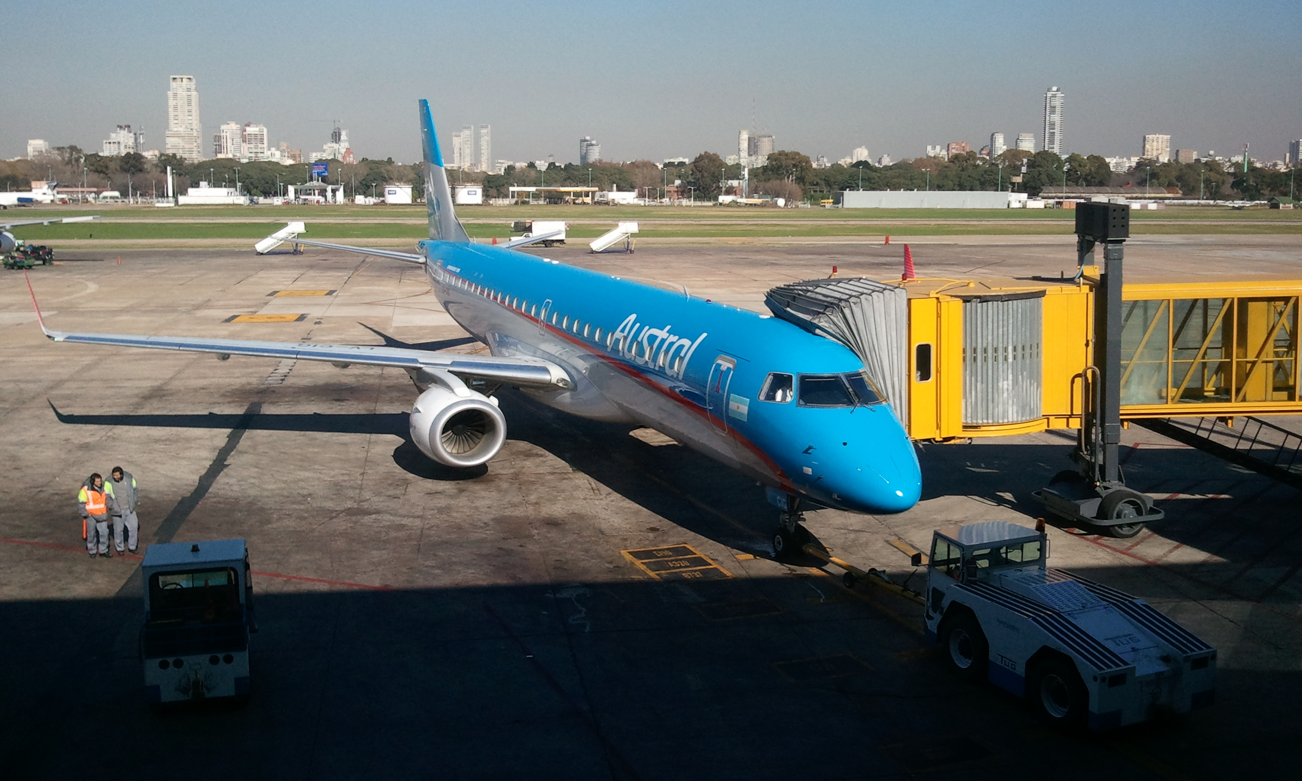 avion de embraer de la empresa austral